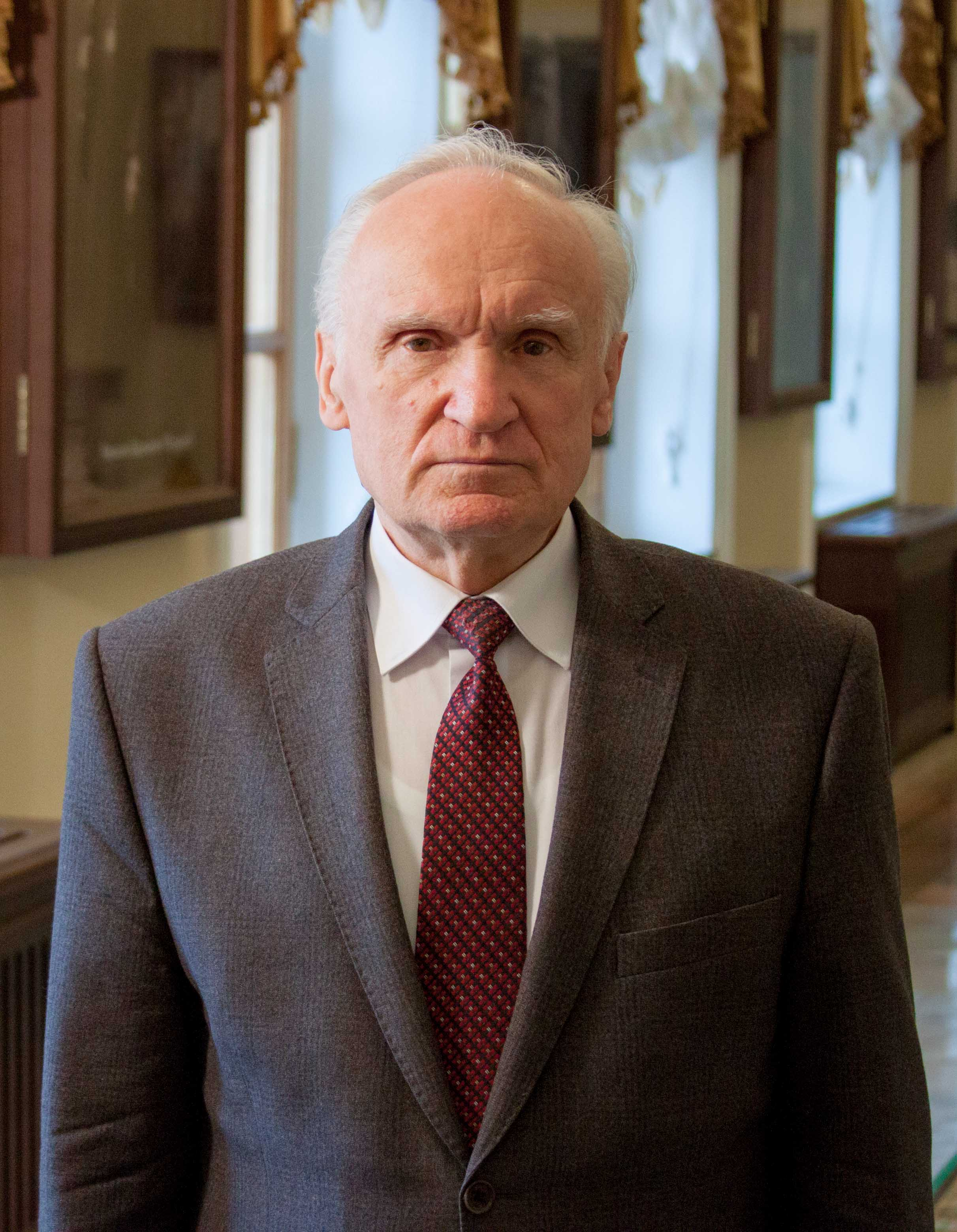 Осипов Алексей Ильич в МПДА